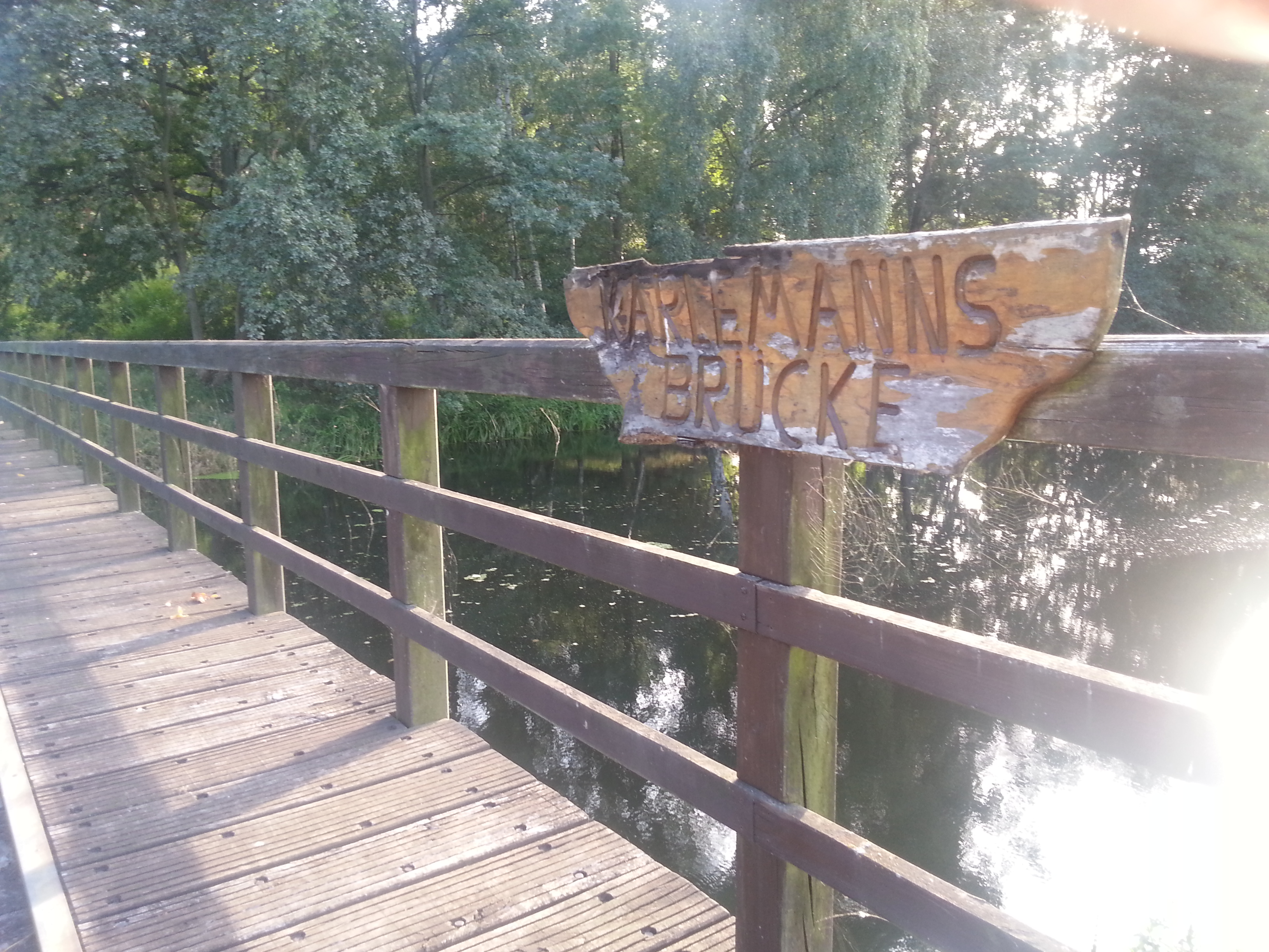 KBIMB